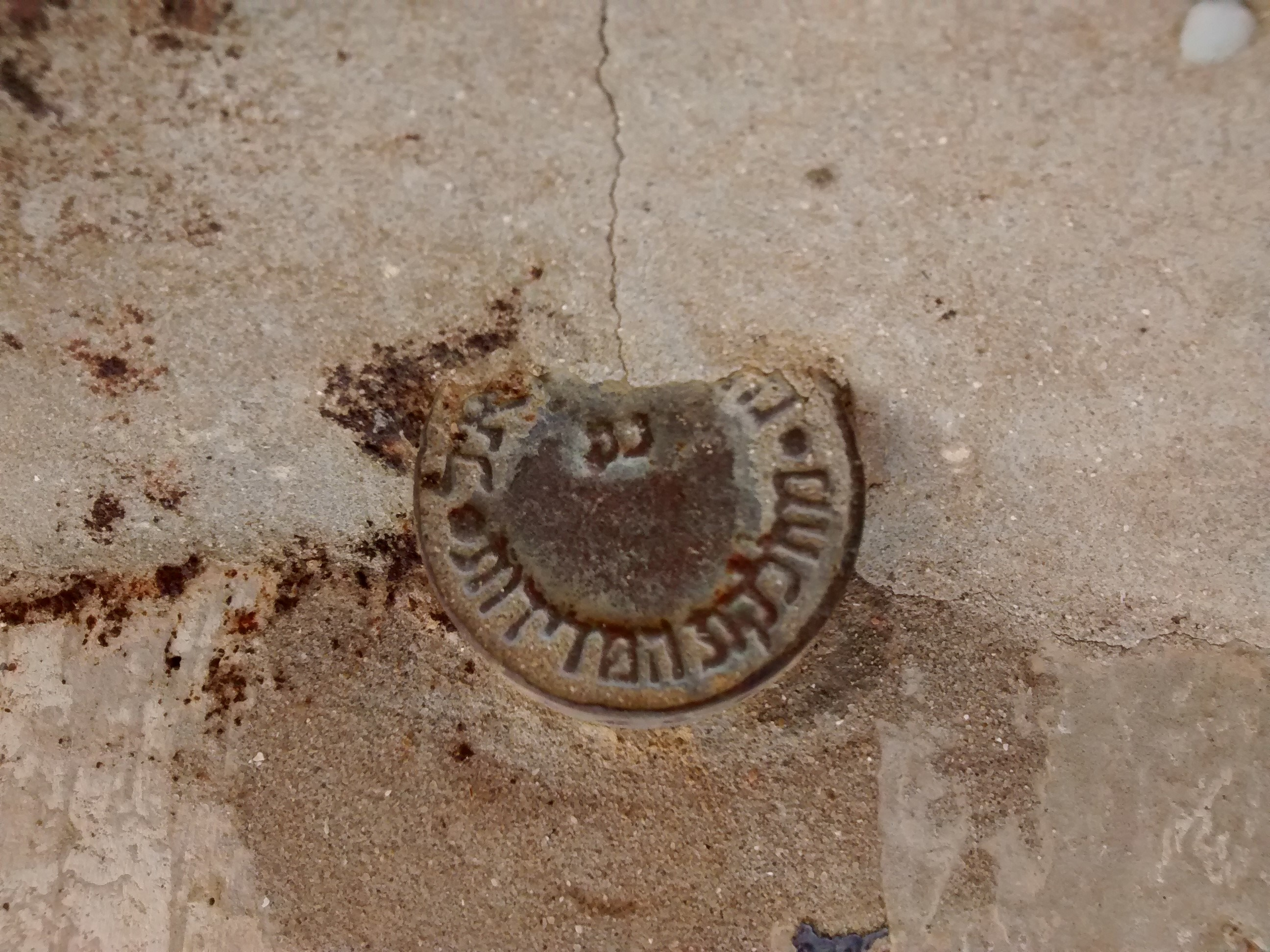 מוזיאון החצר הישנה עין שמר